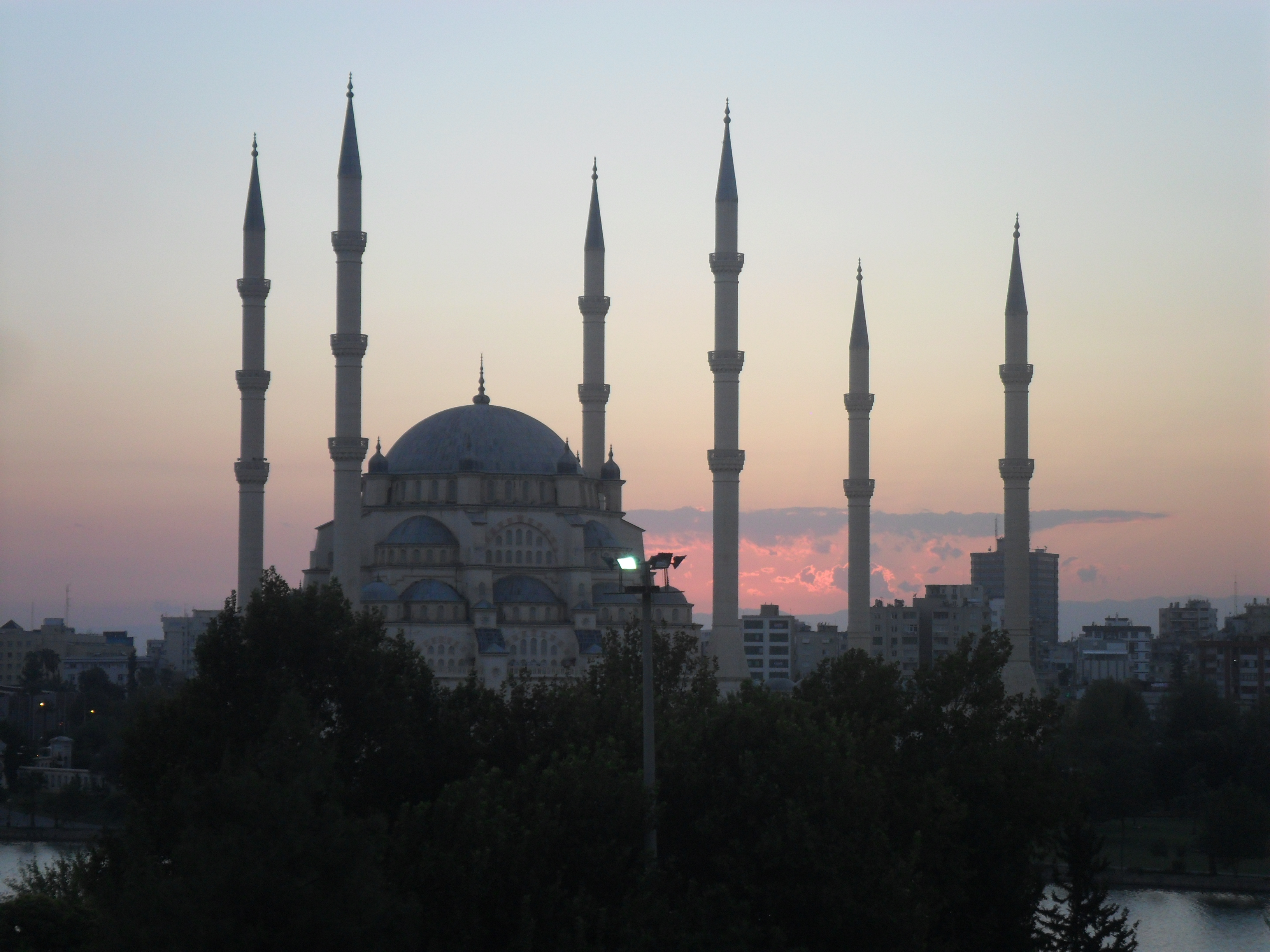 Sabancı Cami'nin akşamüstü çekilmiş bir fotoğrafı.